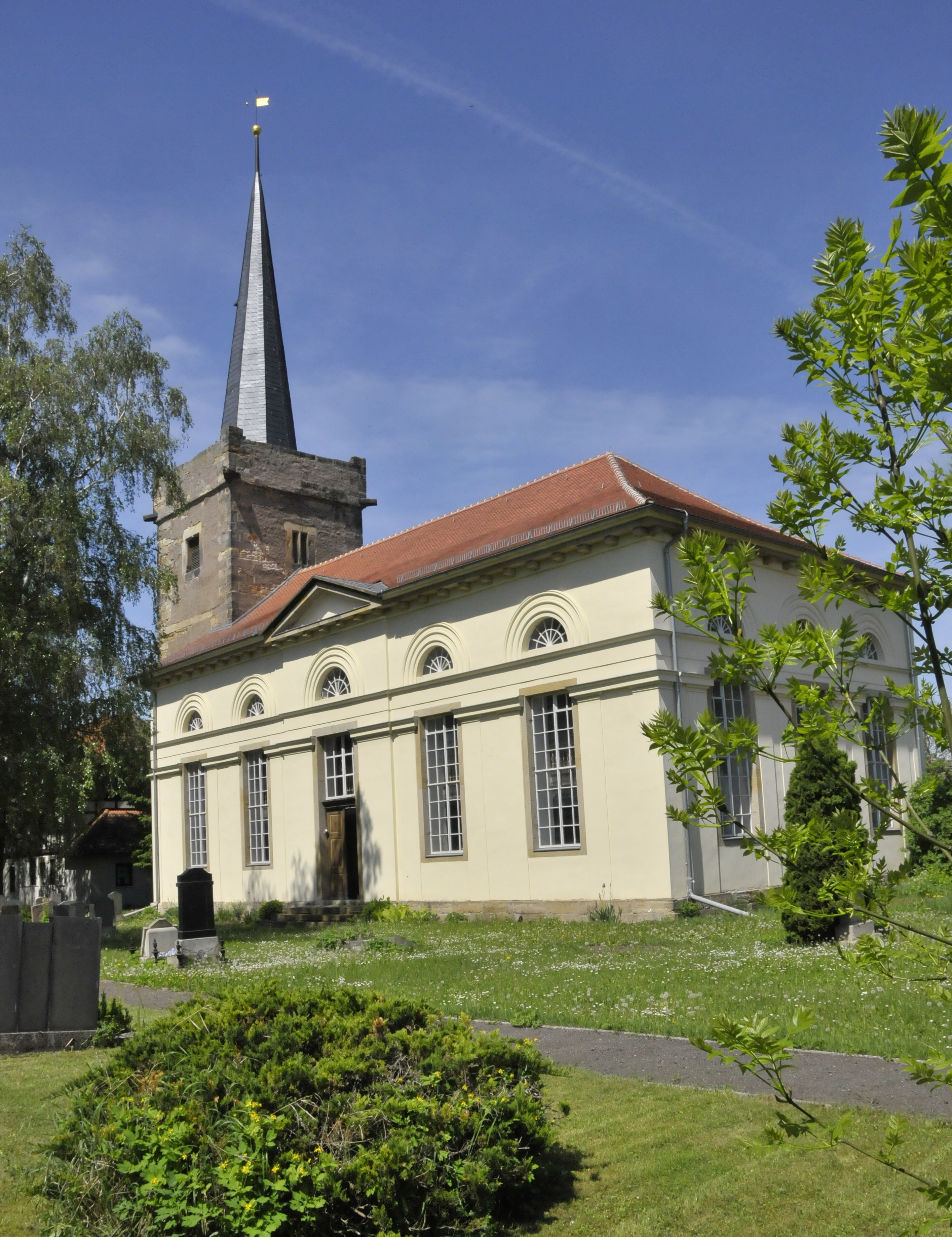 Frienstedt, Kirche